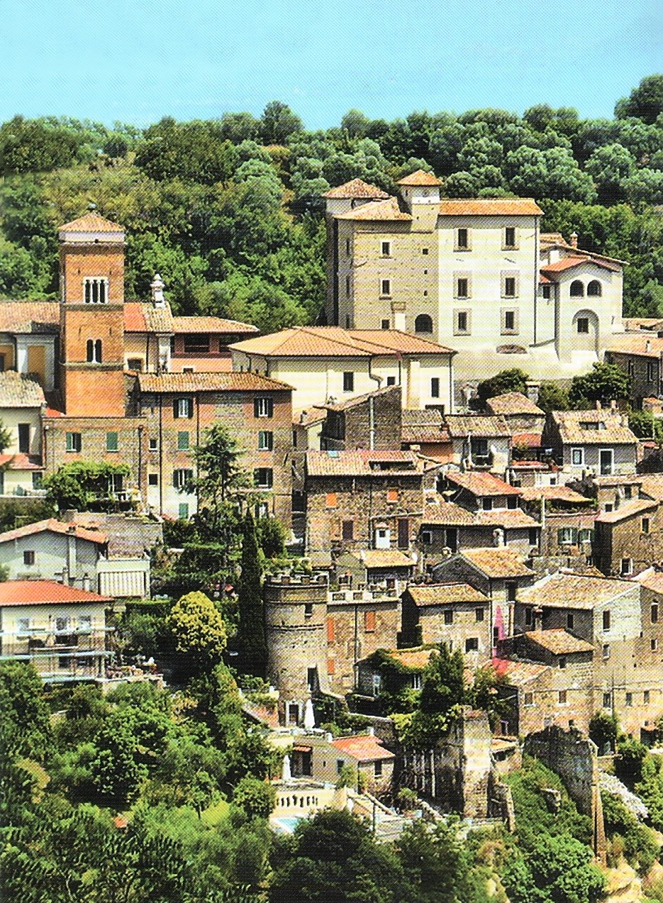 Castelnuovo di Porto - Rocca Colonna